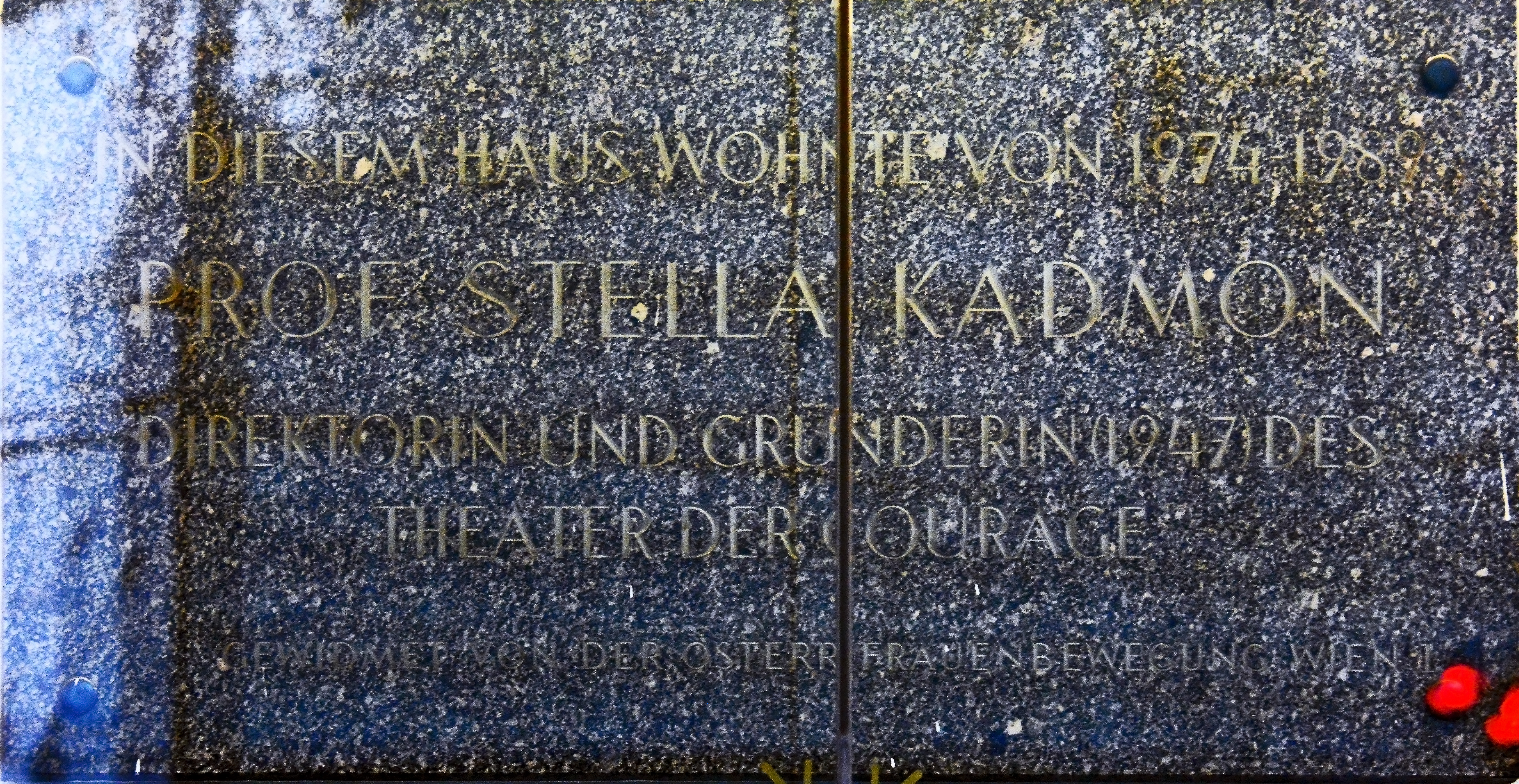 Gedenktafel für Stella Kadmon (Wien, Franz-Josefs-Kai 23)